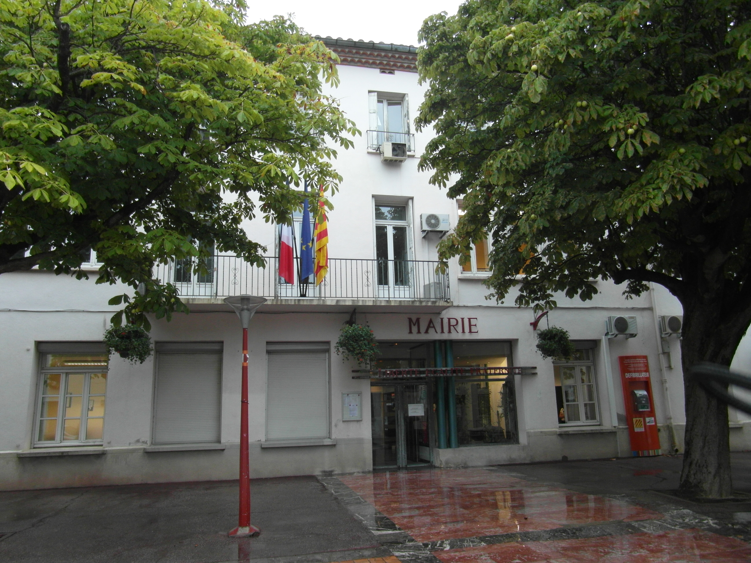 Mairie de Saint-Estève